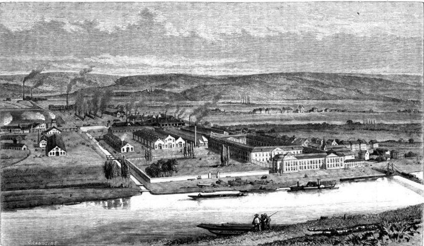 Vue des établissements de John Cockerill à Seraing. Dessin de Gransire